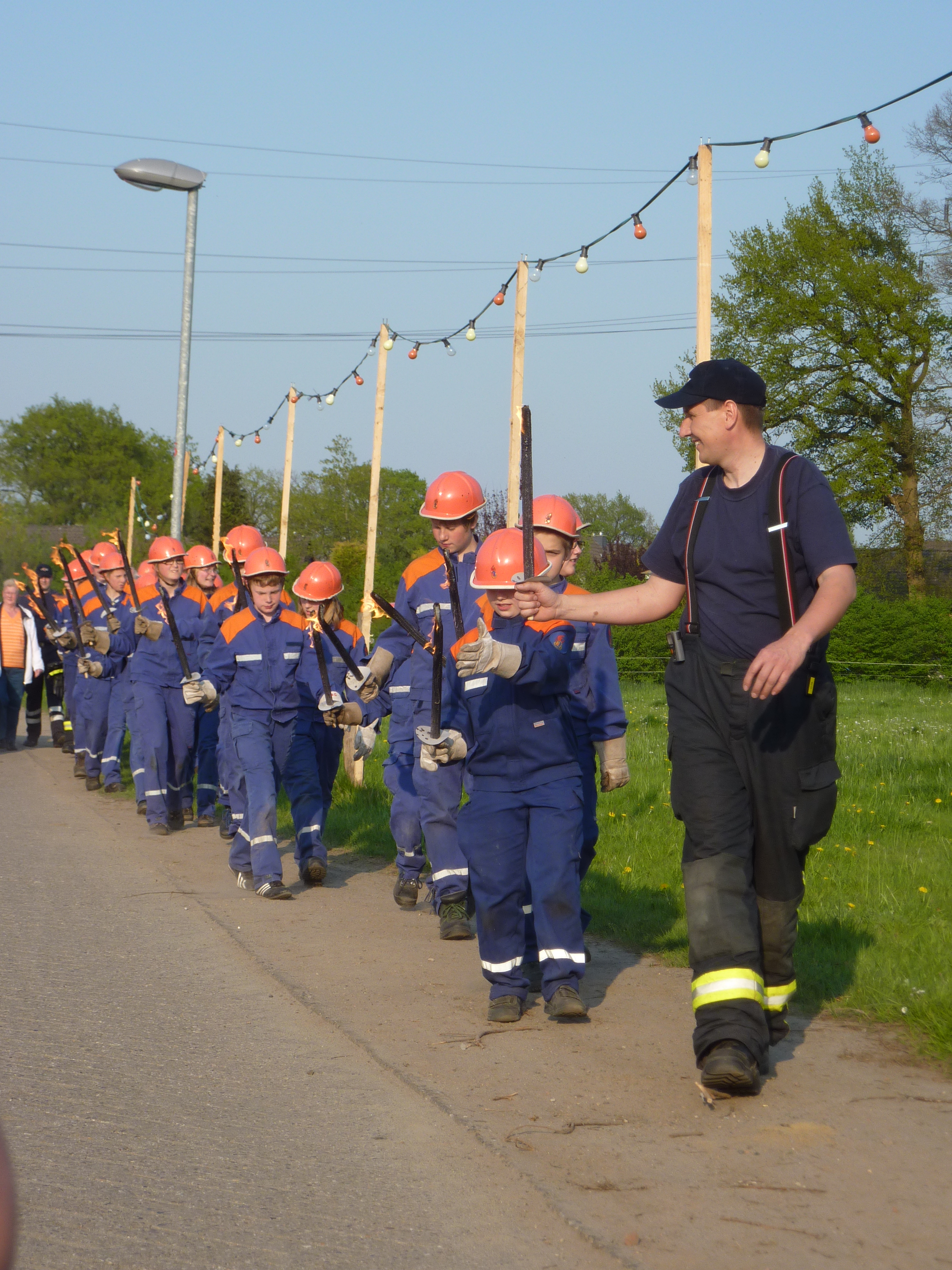 Jugendfeuerwehr Bad Zwischenahn tritt an, um das Osterfeuer zu entzünden